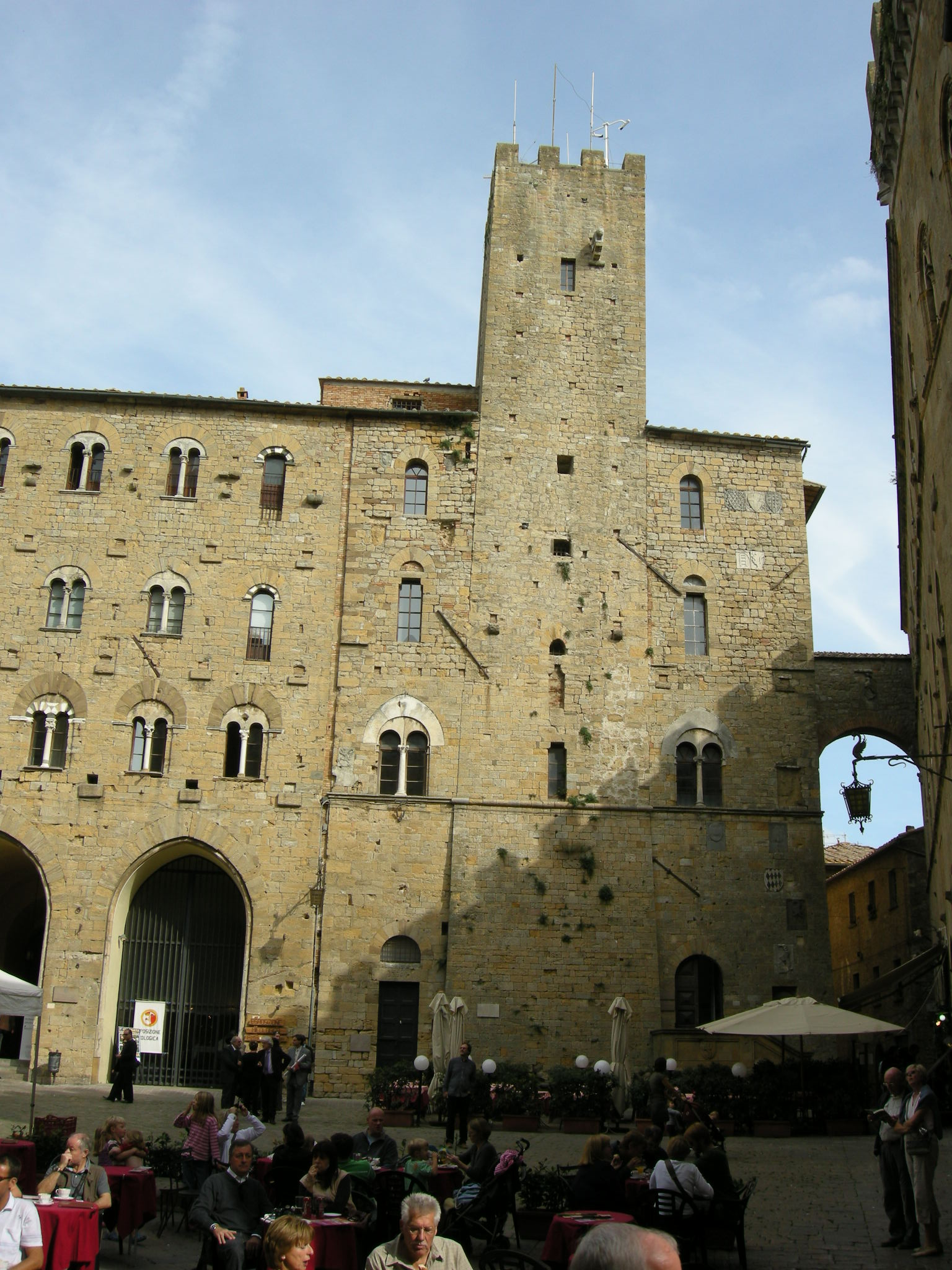 Volterra, piazza dei priori